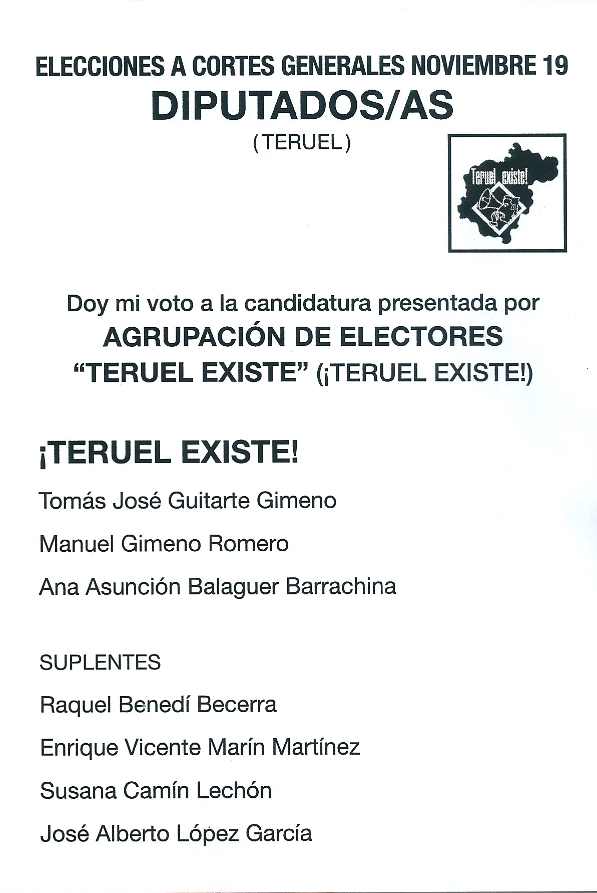 Papeleta electoral de Agrupación de Electores Teruel Existe (¡TERUEL EXISTE!) para el Congreso - Elecciones Generales de España de noviembre de 2019, circunscripción de Teruel.